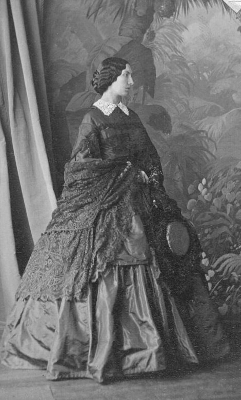 Пелагея Браницкая, урожденная Замойская (1830—1894)